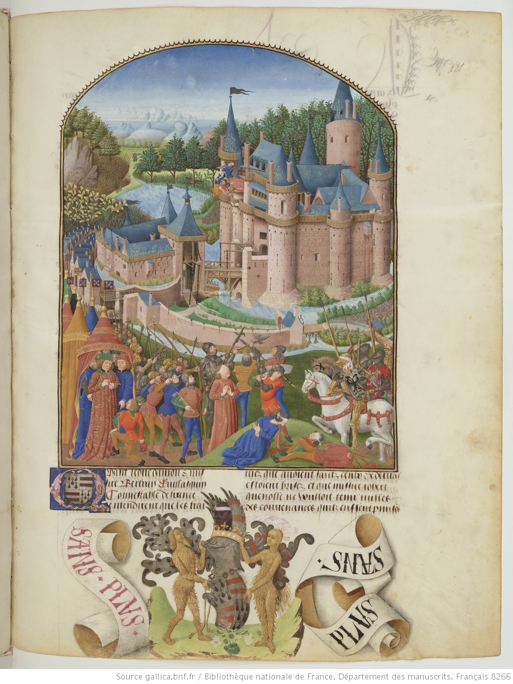 Cette enluminure représente le siège du château de Derval au XIVème siècle